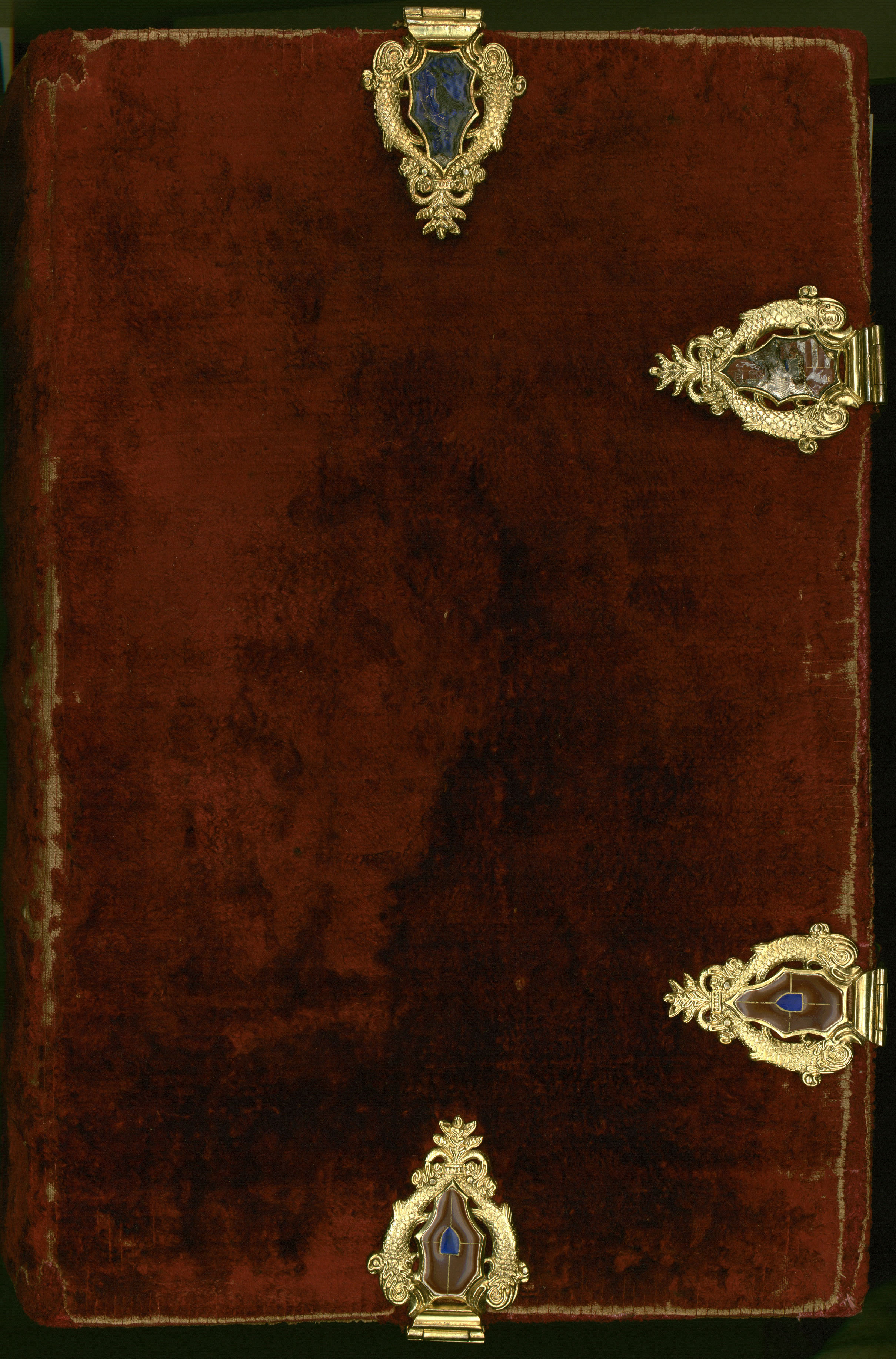 Szent Ágoston, Isten városa corvina vörösbársony fedele. A kódex 1475 és 1480 között készülhetett Nápolyban. Scriptora az utrechti Petrus de Middelburch, főminiátora a rothemburgi származású, akkoriban Nápolyban működő mester, Gioacchino de Gigantibus volt. A kötet illuminálásban - valószínűleg a nagy terjedelem miatt - további miniátorok is részt vettek.